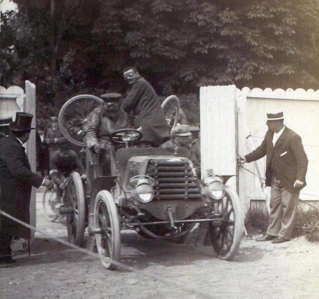 [Collection Jules Beau. Photographie sportive] : T. 9. AnnÃ©e 1899 / Jules Beau : F. 20v. Course Bordeaux - Paris, [1899]